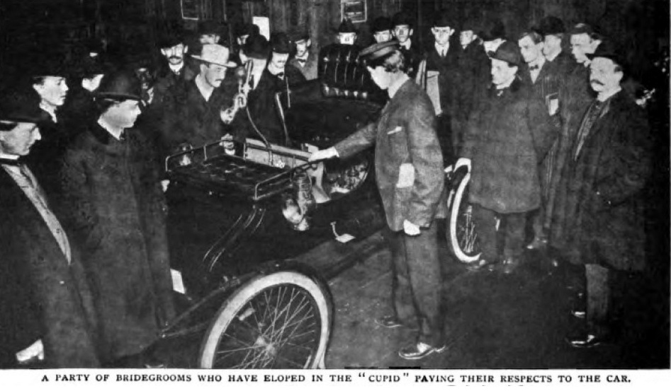 Bob Walter - The Cupid car